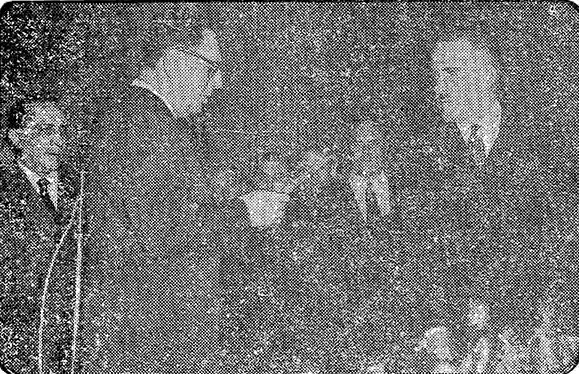 Jura de Ildefonso Cavagna Martínez como ministro de relaciones exteriores de Argentina.